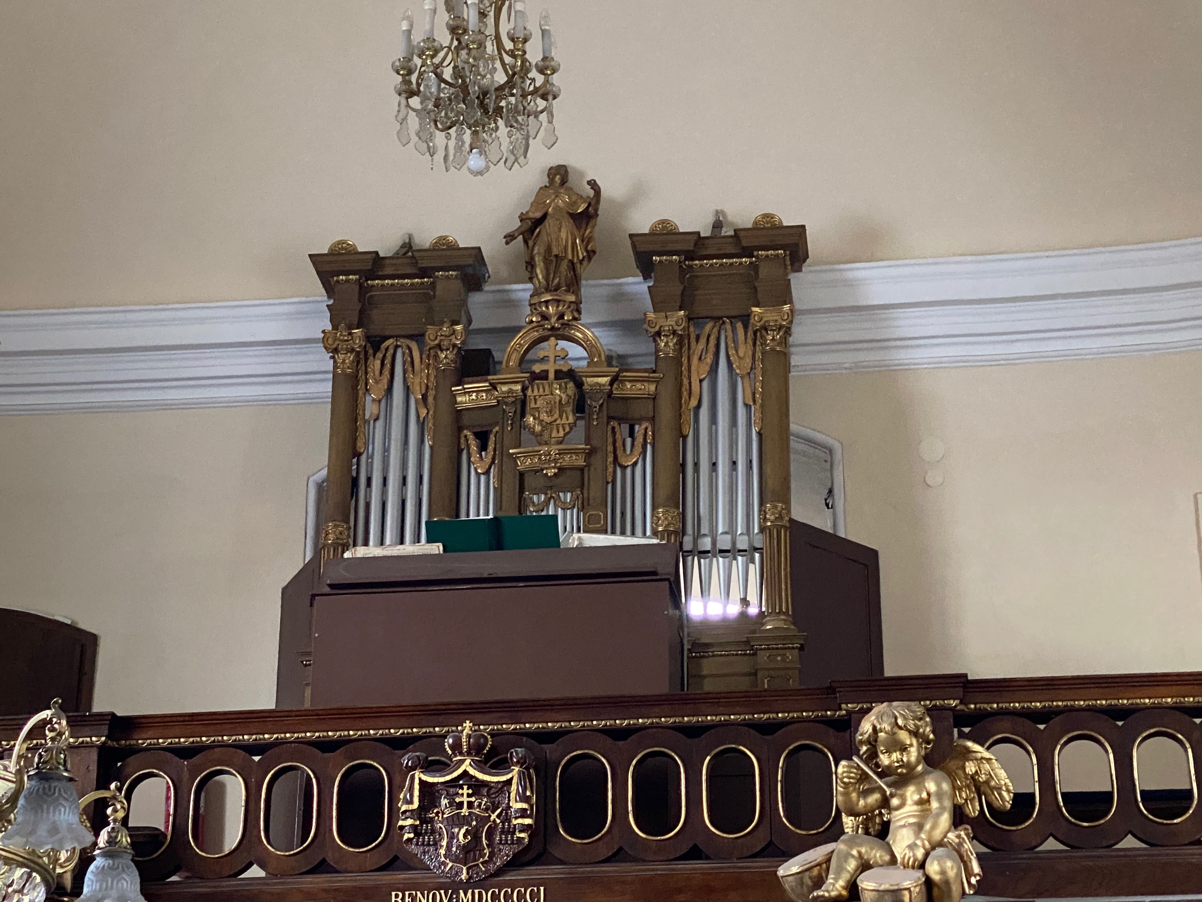 Orgue de l'Esglèsia de Sant Maximilià de Hukvaldy